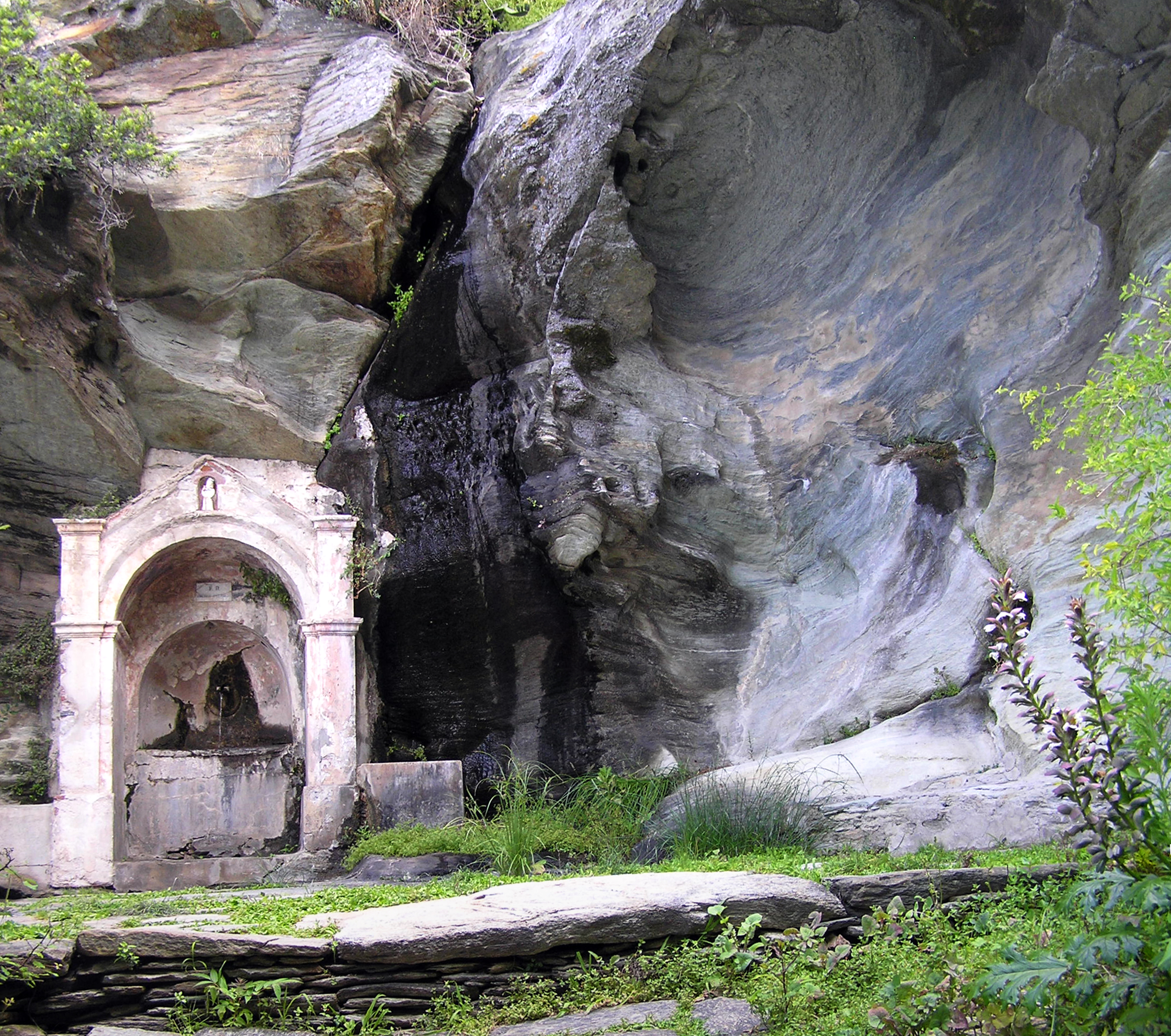 Centuri (Corse) - Fontaine du vilage de Cannelle